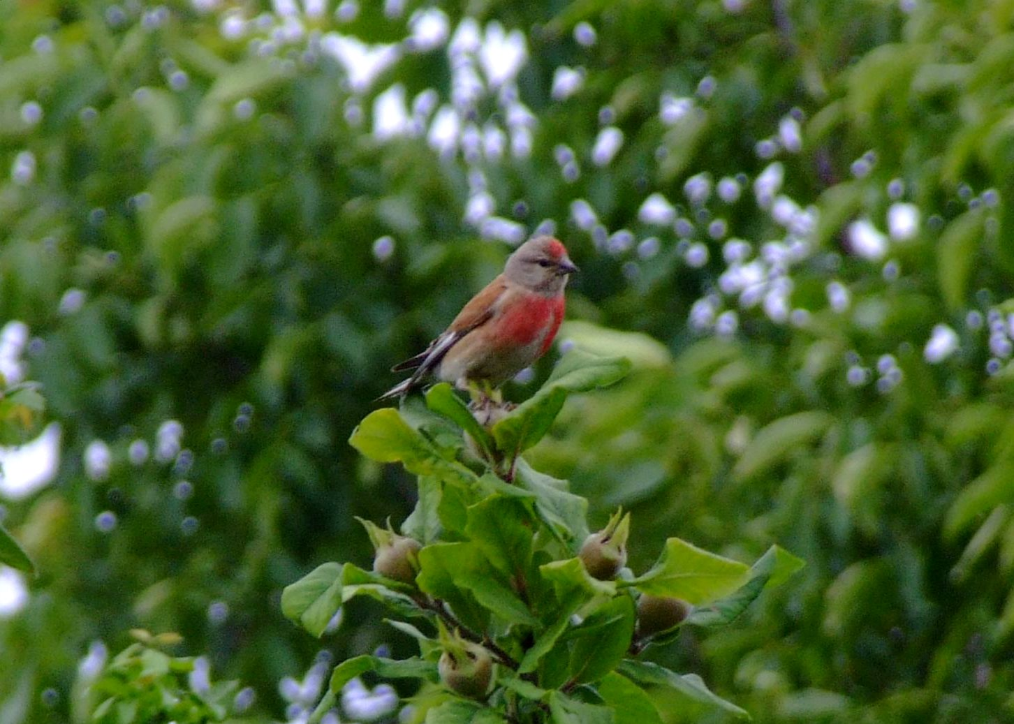 Linnet (male) on a tree